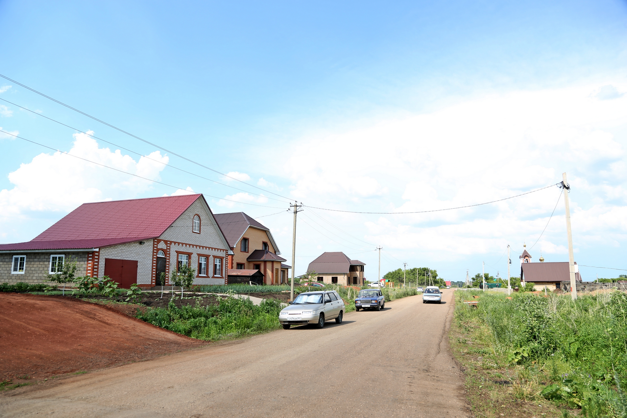 Столяровка стремительно застраивается